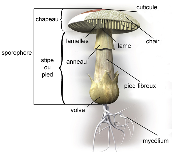 Agaricale